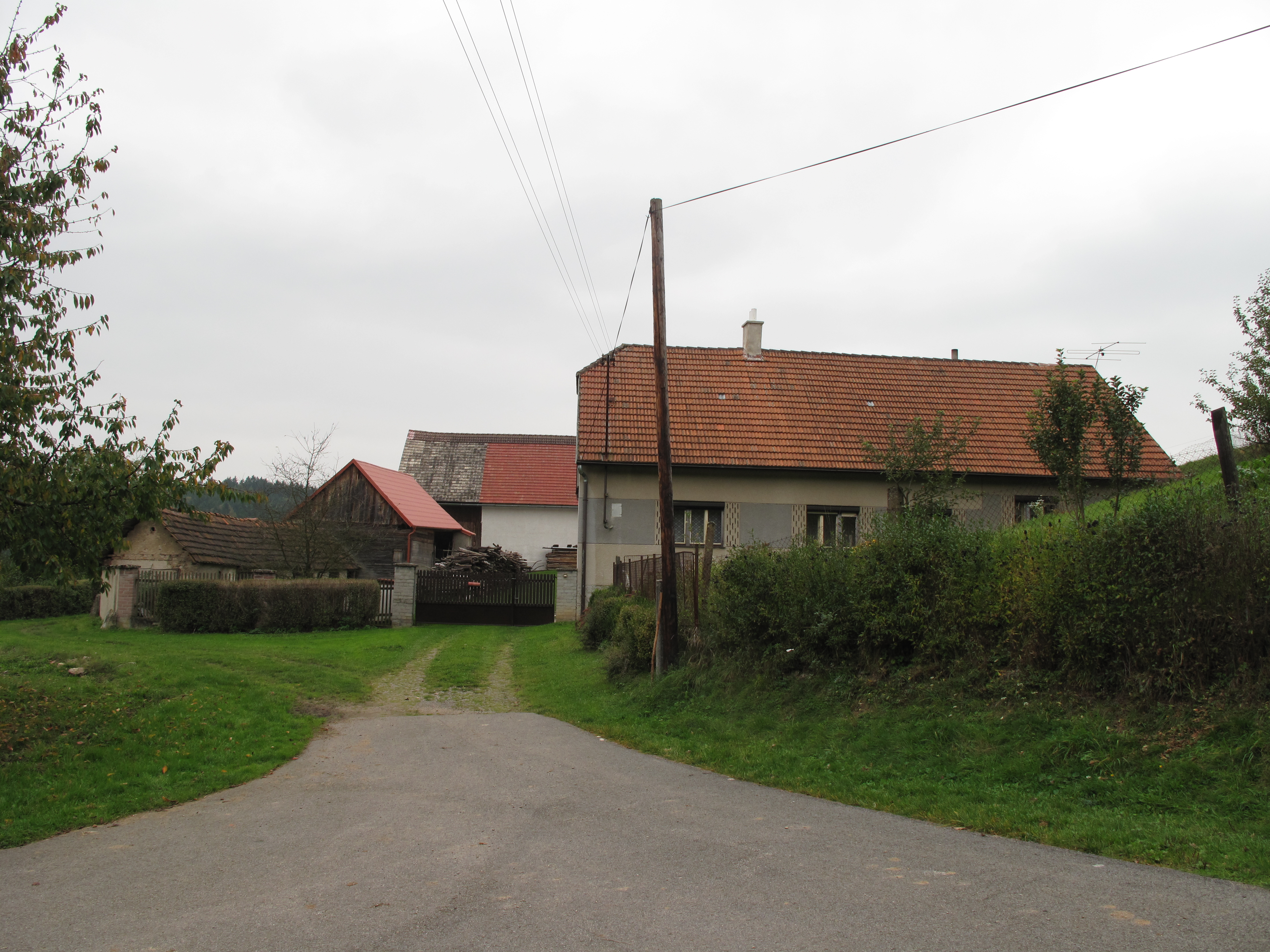 Domy v Ondřejovci. Okres Benešov, Česká republika.